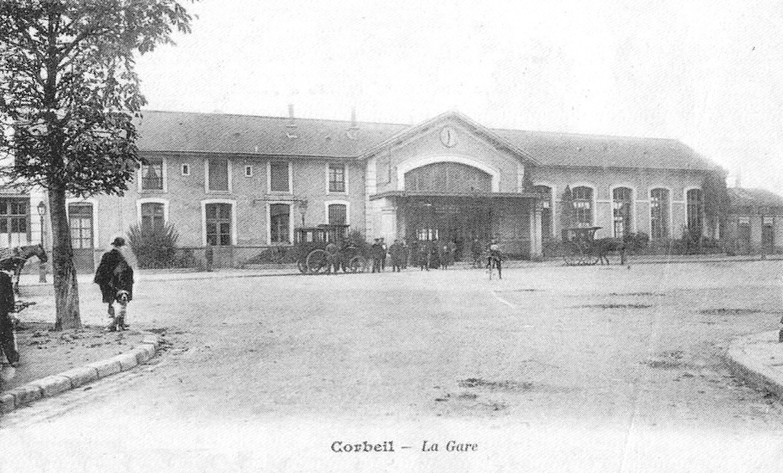 La gare de Corbeil (Essonne), au début du XX° siècle.